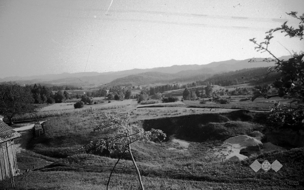 Laporje z Gradeža.